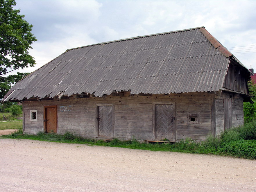 Klėtis (past. XIX a. pab.) Lėtenių kaime, Mažeikių raj., Tirkšlių seniūniojoje Foto: Algirdas, 2006 m. rugpjūčio 2 d., Lietuva